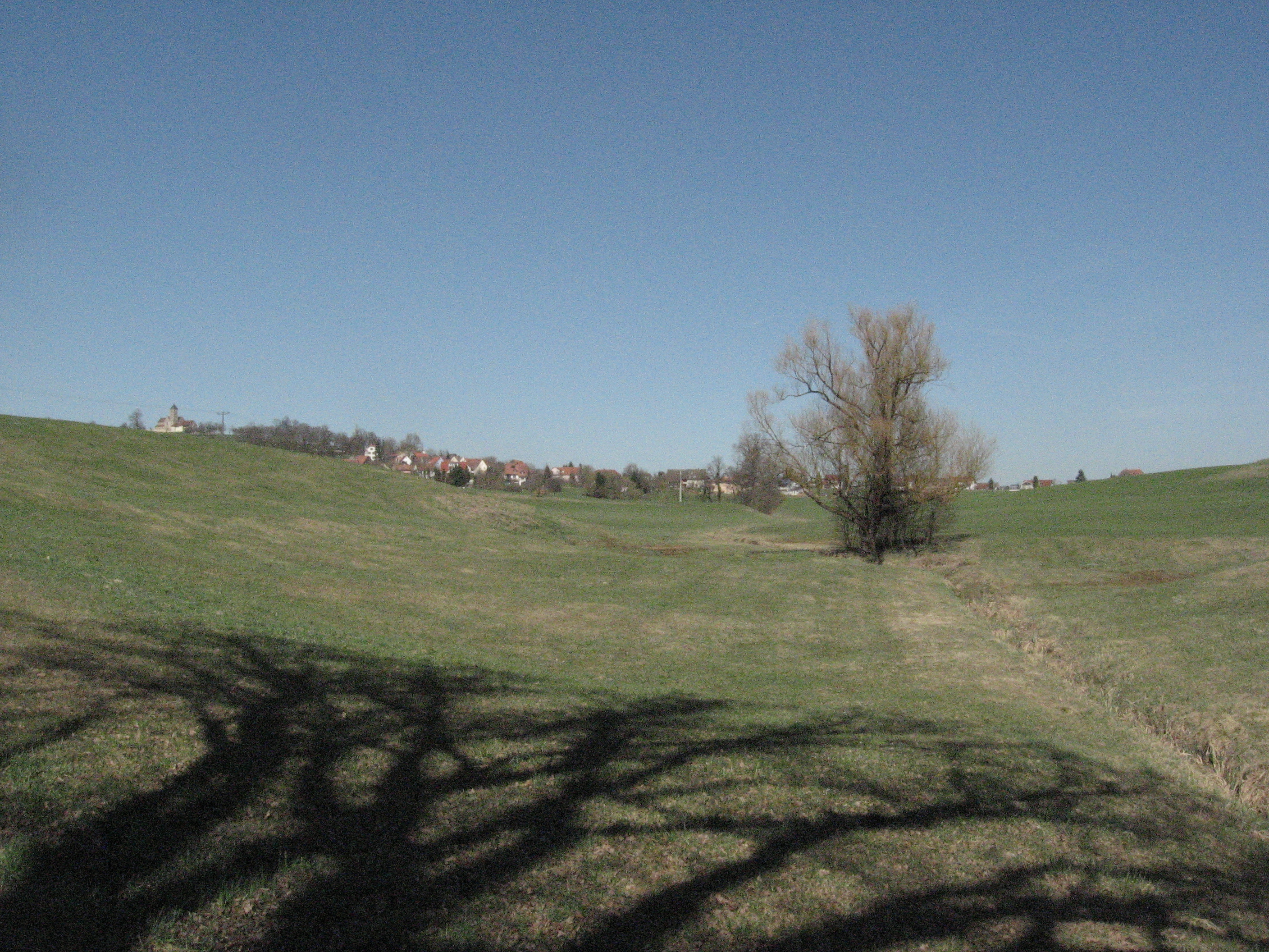 Blick von unterhalb des Rosenberger Dieselhofes über die oberste Talmulde des Rotenbachs in Richtung Nordnordwesten auf Rosenberg (Württemberg)-Hohenberg.